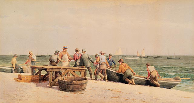 Are you ready, lads?